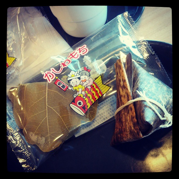 中文（香港）: 柏餅與粽是日本端午節常見食品